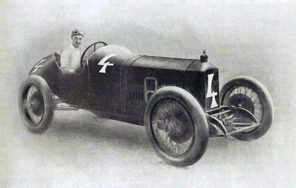 André Boillot, premier français vainqueur de la Targa Floriot, en 1919 sur Peugeot EXS.